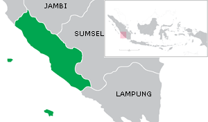 Map of Bengkulu province, Sumatra island, Indonesia